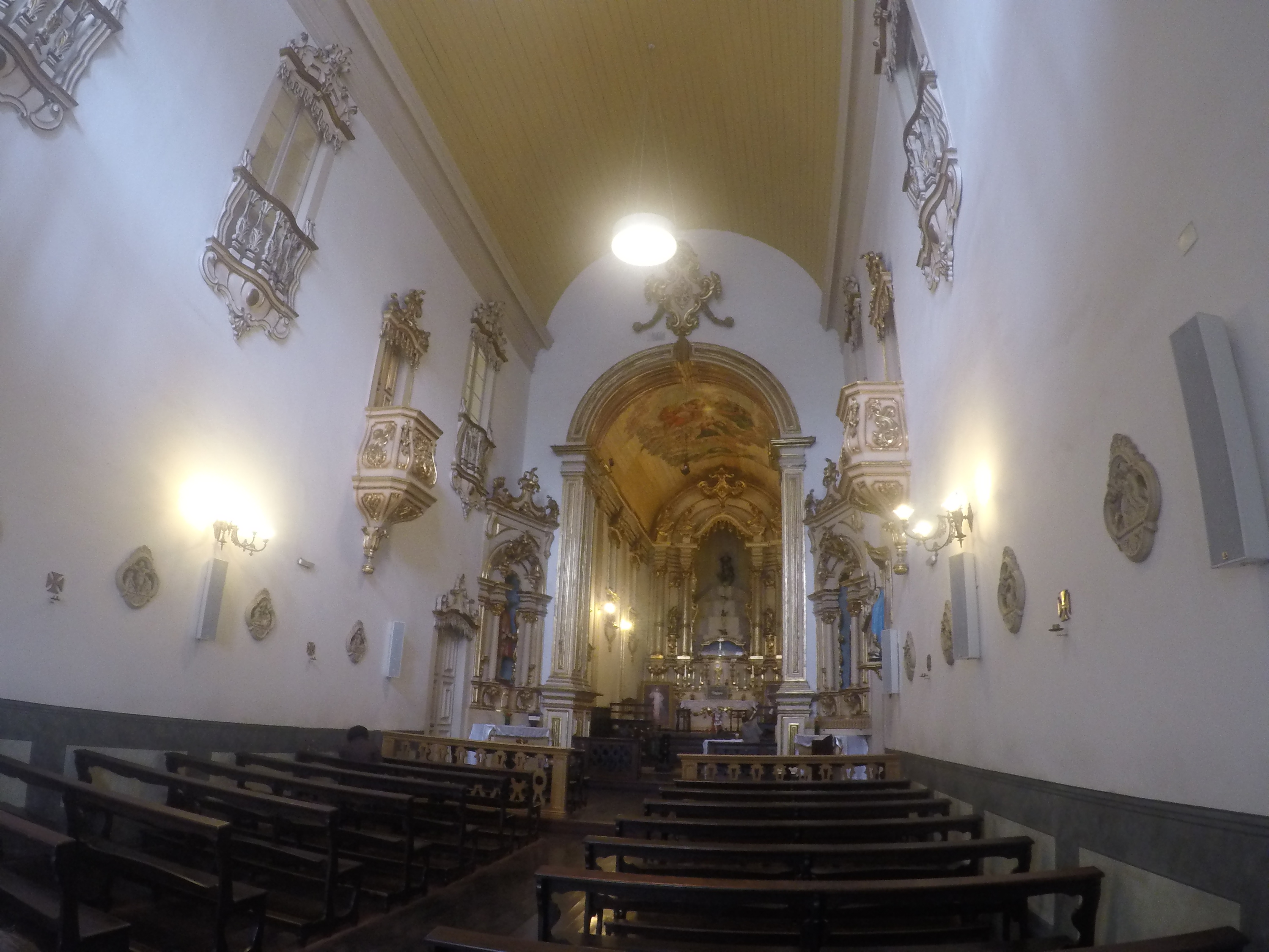 Bancos e paredes ornadas da Igreja Nossa Senhora da Boa Morte, São Paulo (SP)